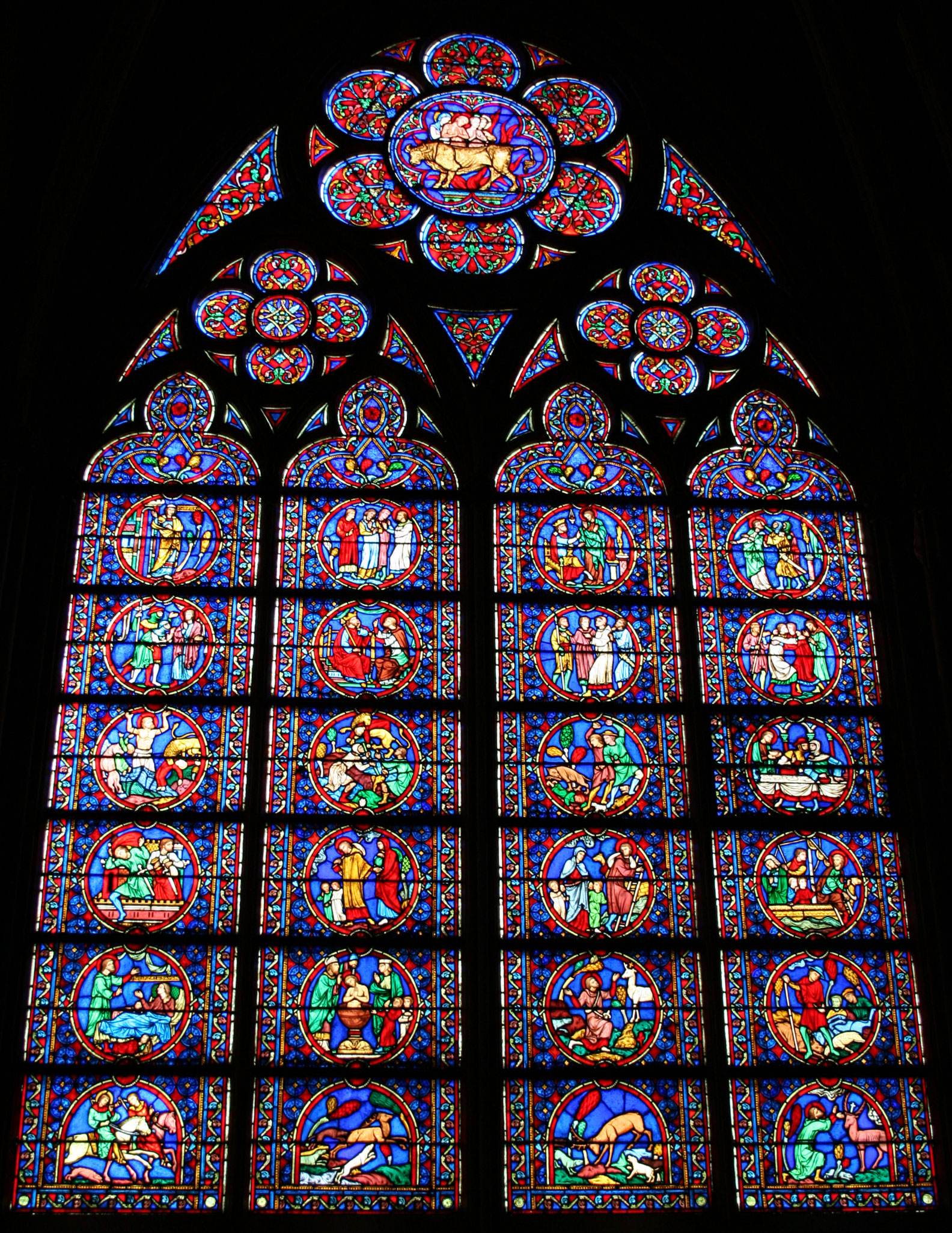 Vetrata interna di Notre-Dame a Parigi